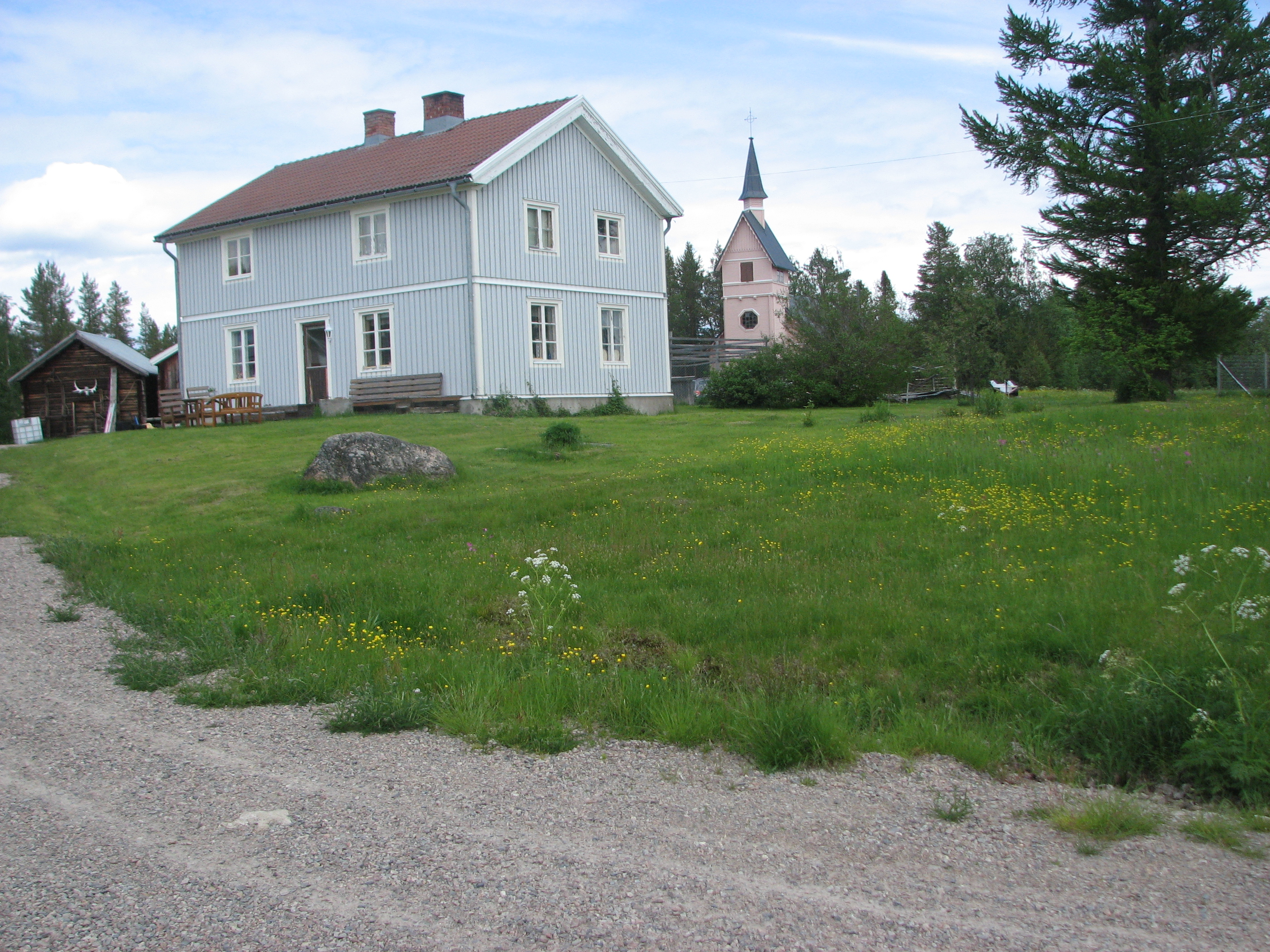 Bergnäsudden village, Arjeplog, Sweden